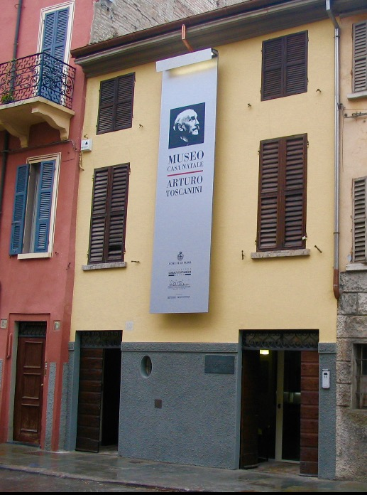 museo casa natale toscanini parma